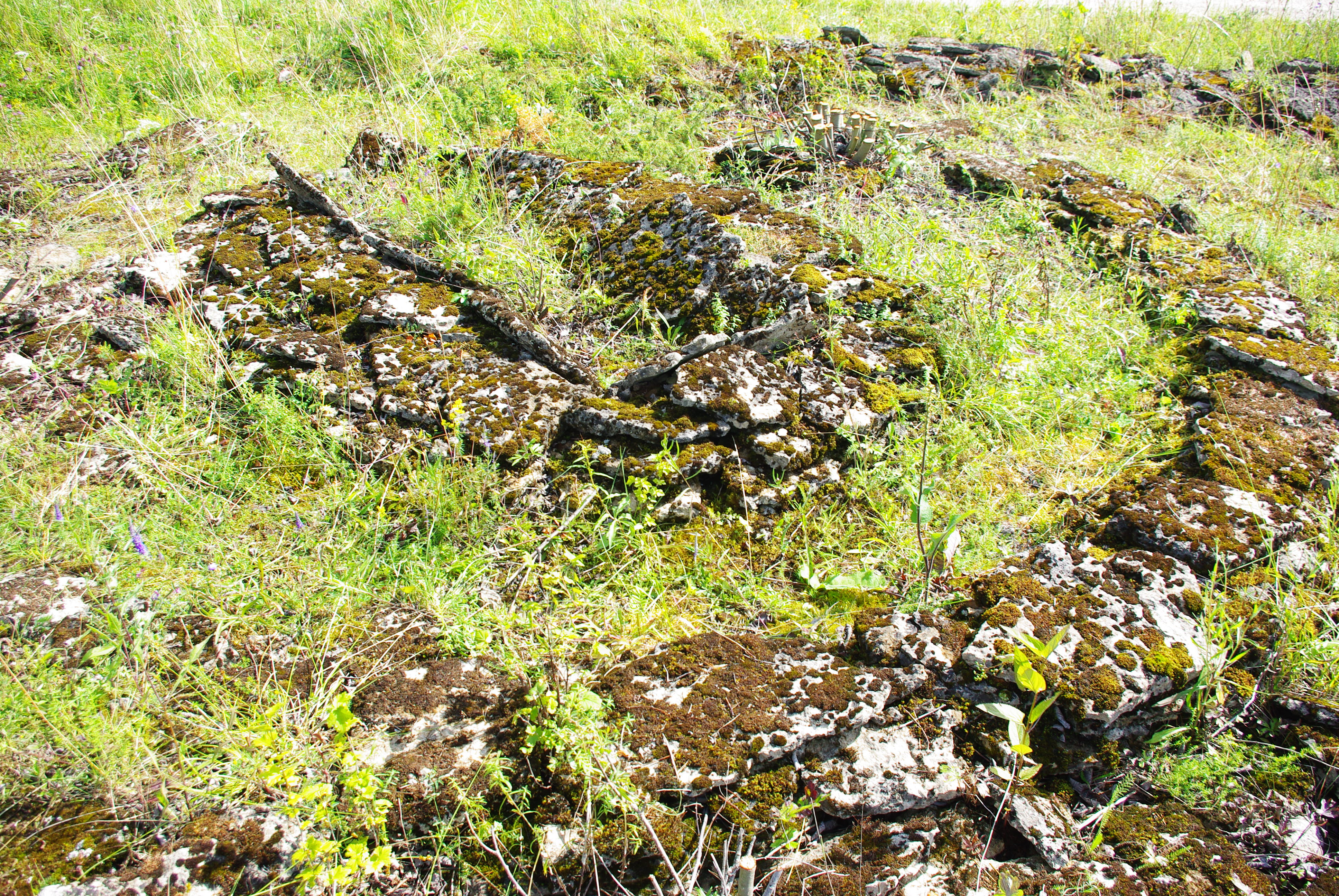 Kivikirstkalmed